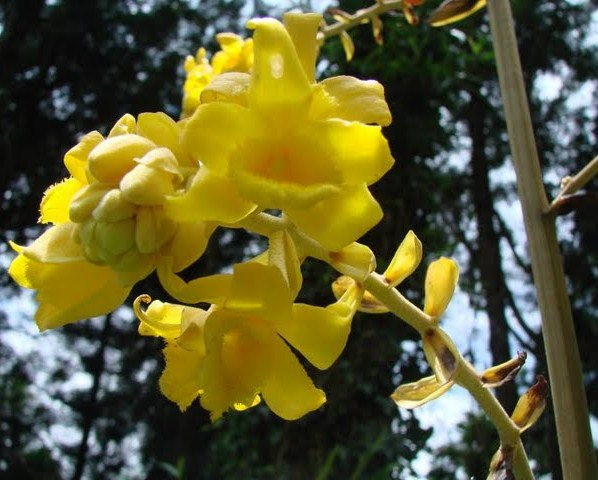 毛萼山珊瑚 - Galeola lindleyana